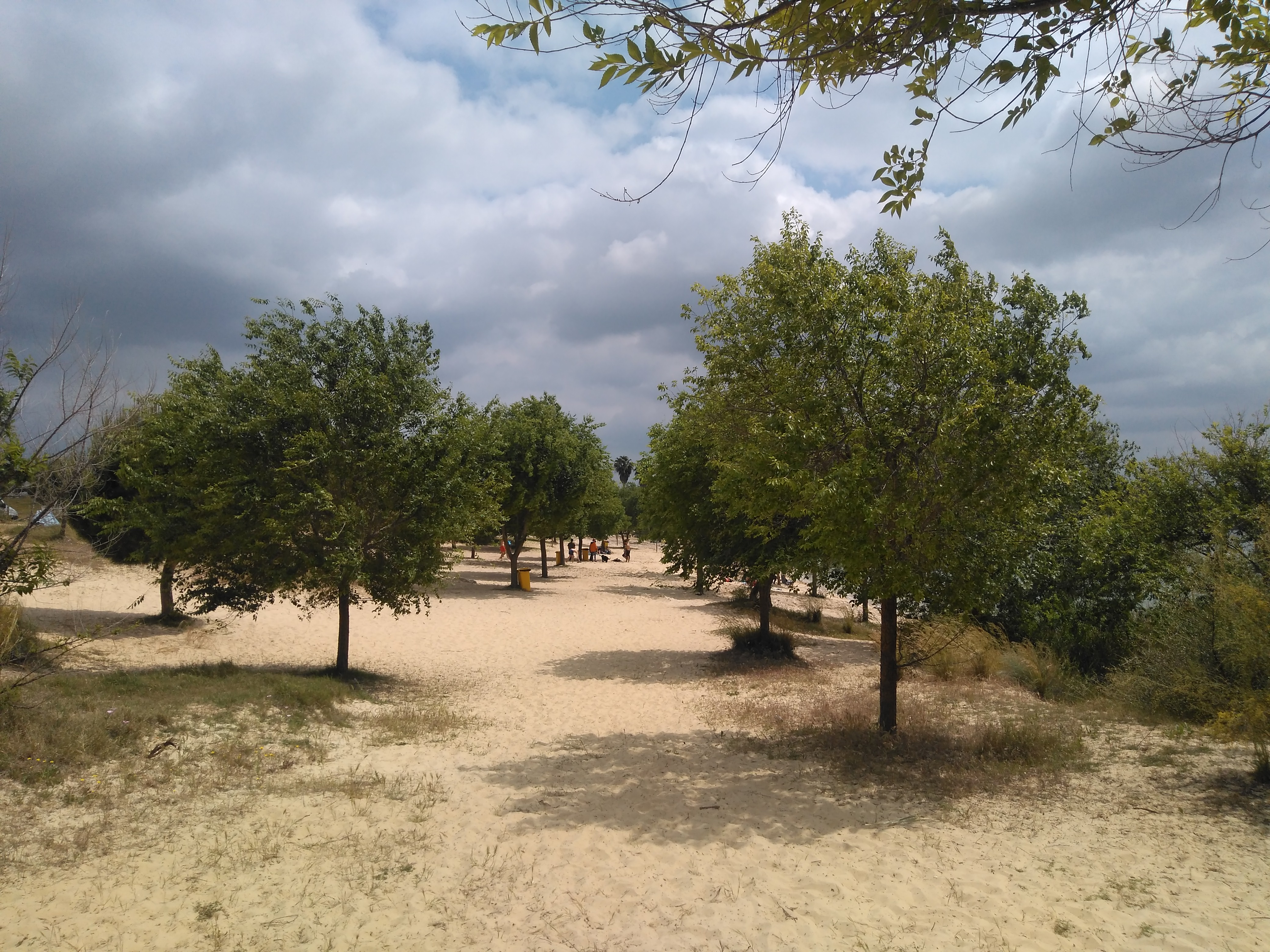 Playa de El Santiscal, Arcos de la Frontera (España)